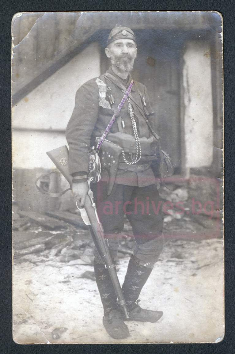 Иван Драганов Куюмджиев, ЦДА, фонд 771К, опис 1, а.е. 275, л. 1